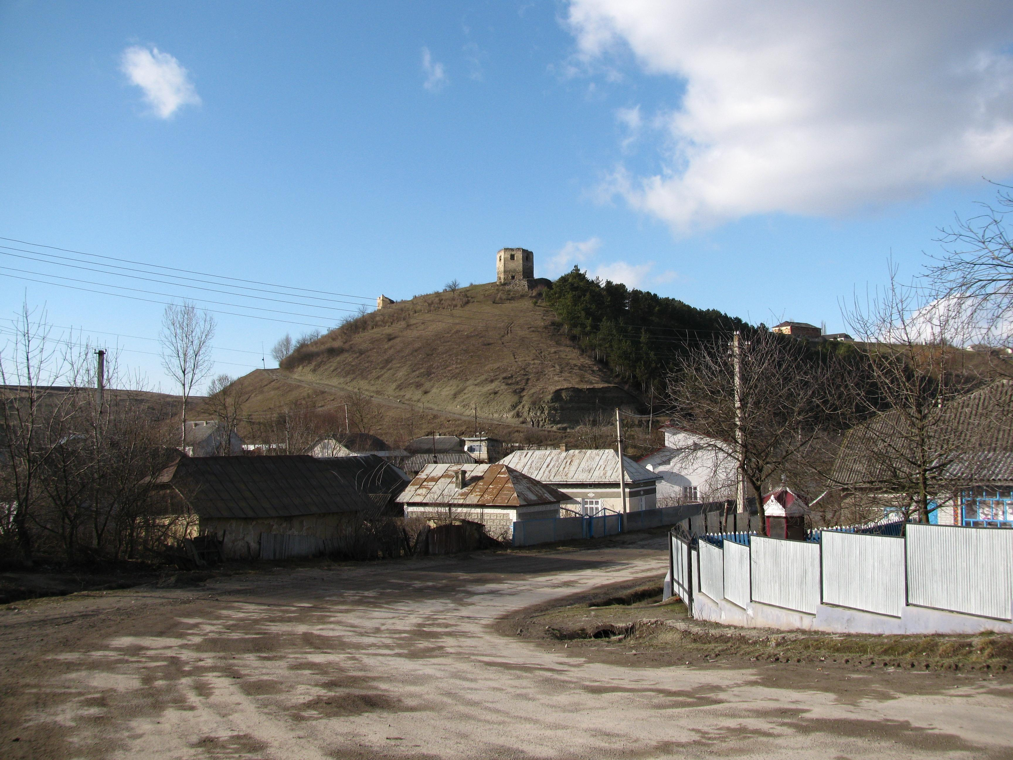 село Висічка в Борщівському районі Тернопільської області. Розташоване на північному заході району над річкою Нічлава